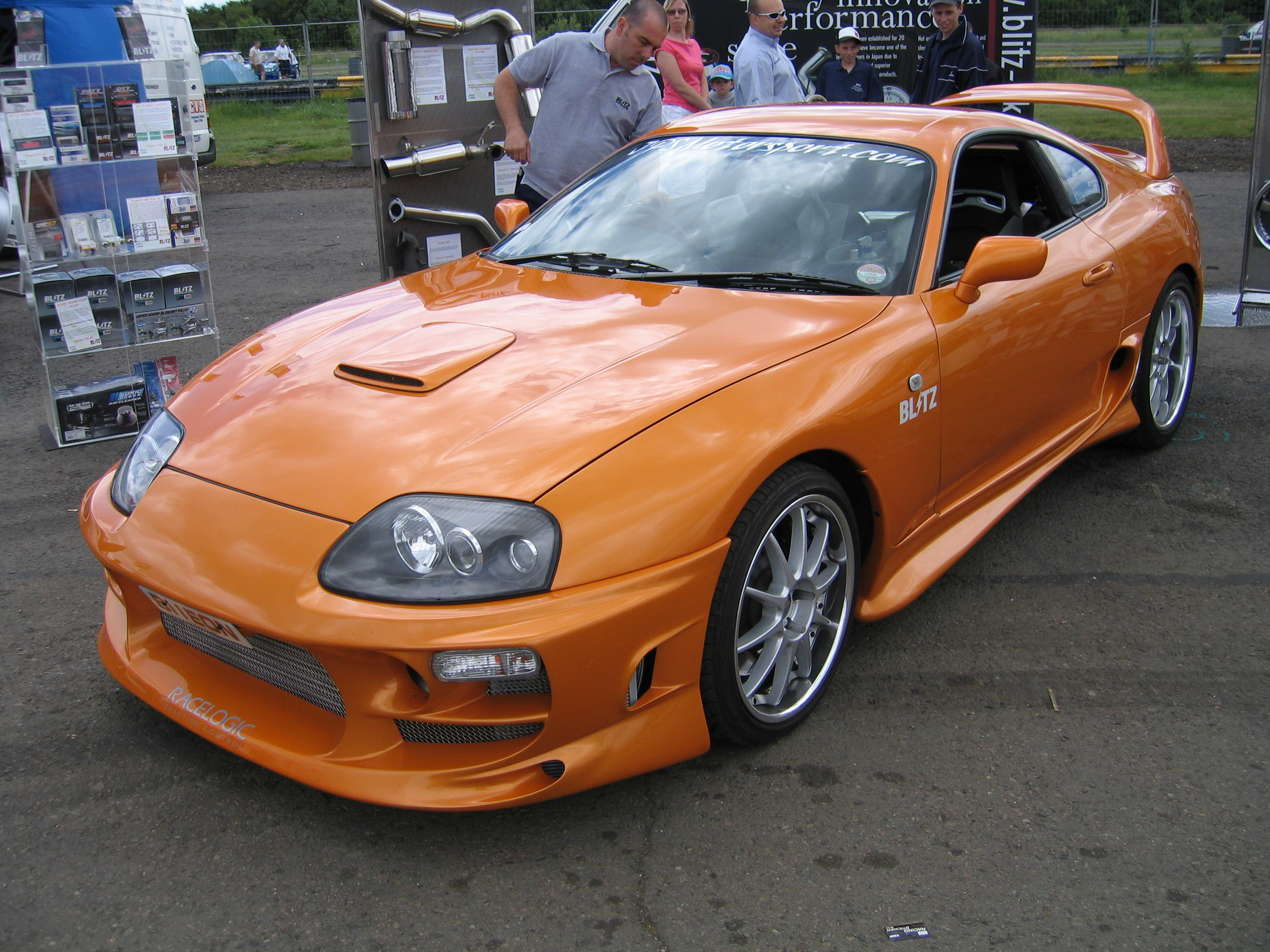 A funky orange Supra